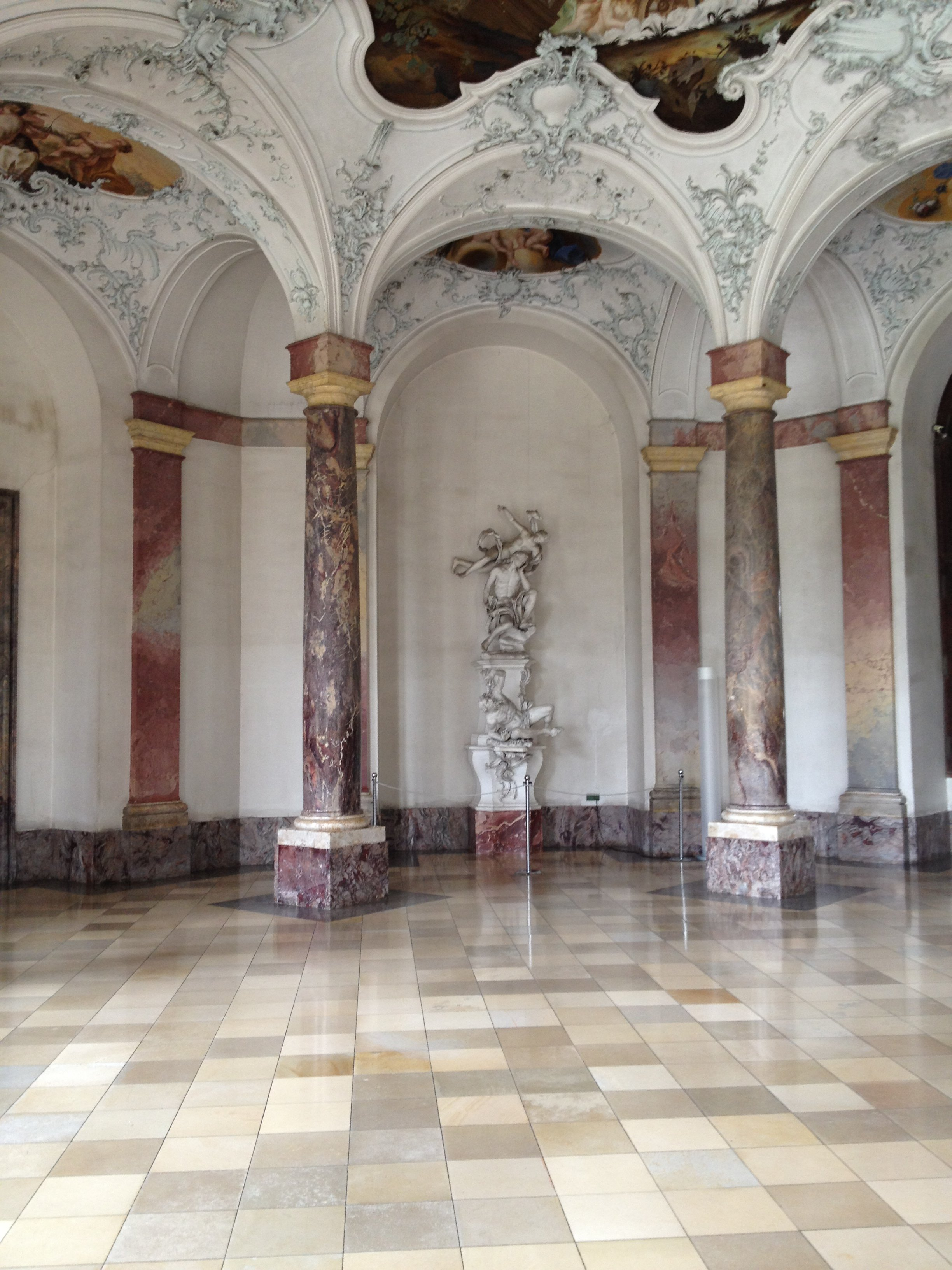 Würzburg Residence